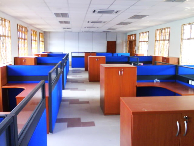 Bilik guru di SKFS